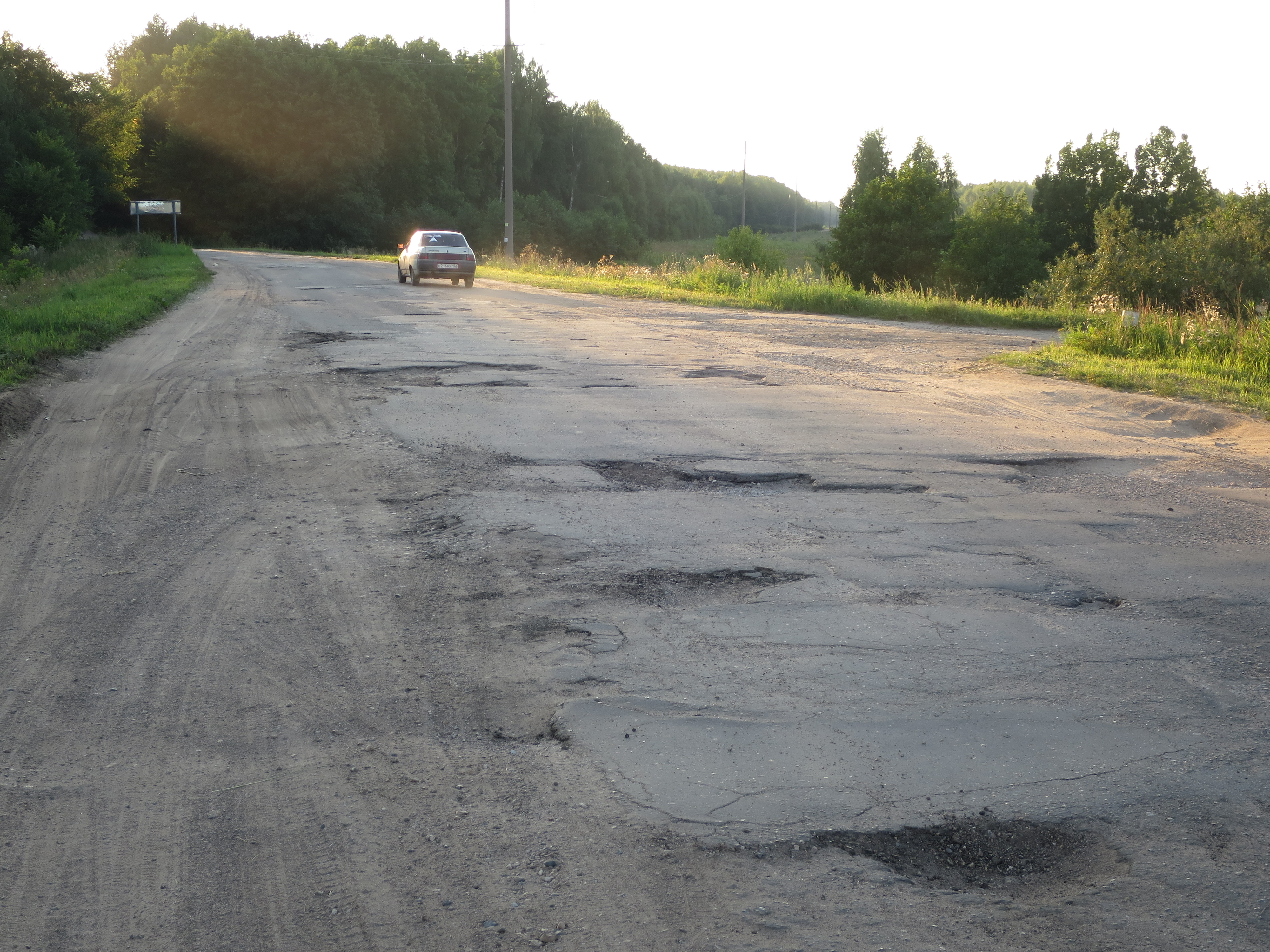 Дорога Арзамасский район